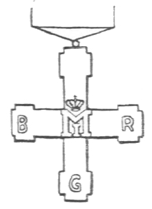 Rumänisches Ehrenzeichen Zur Erinnerung (Insemnul Onorific "In Amintire")